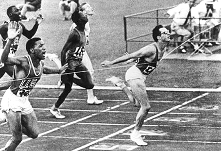 Arrivo vittorioso di Livio Berruti ai Giochi della XVII Olimpiade di Roma nel 1960